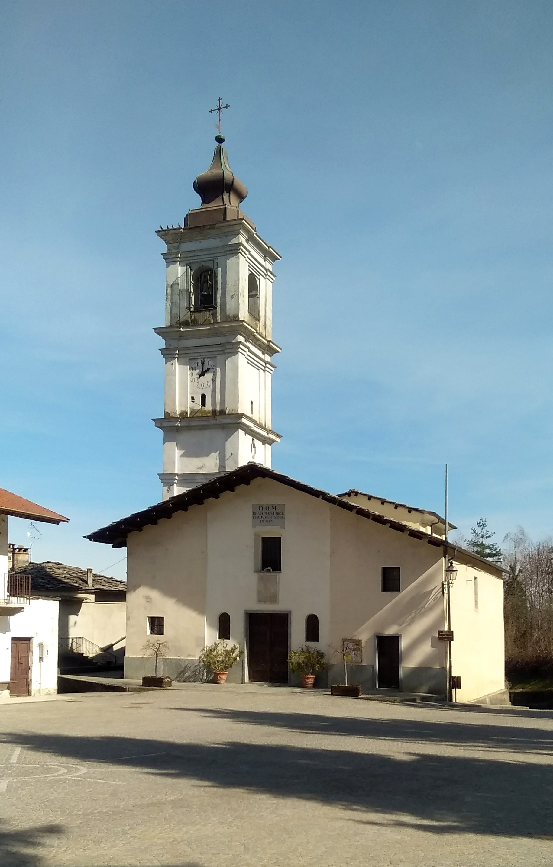 Gambasca (CN) la chiesa parrocchiale